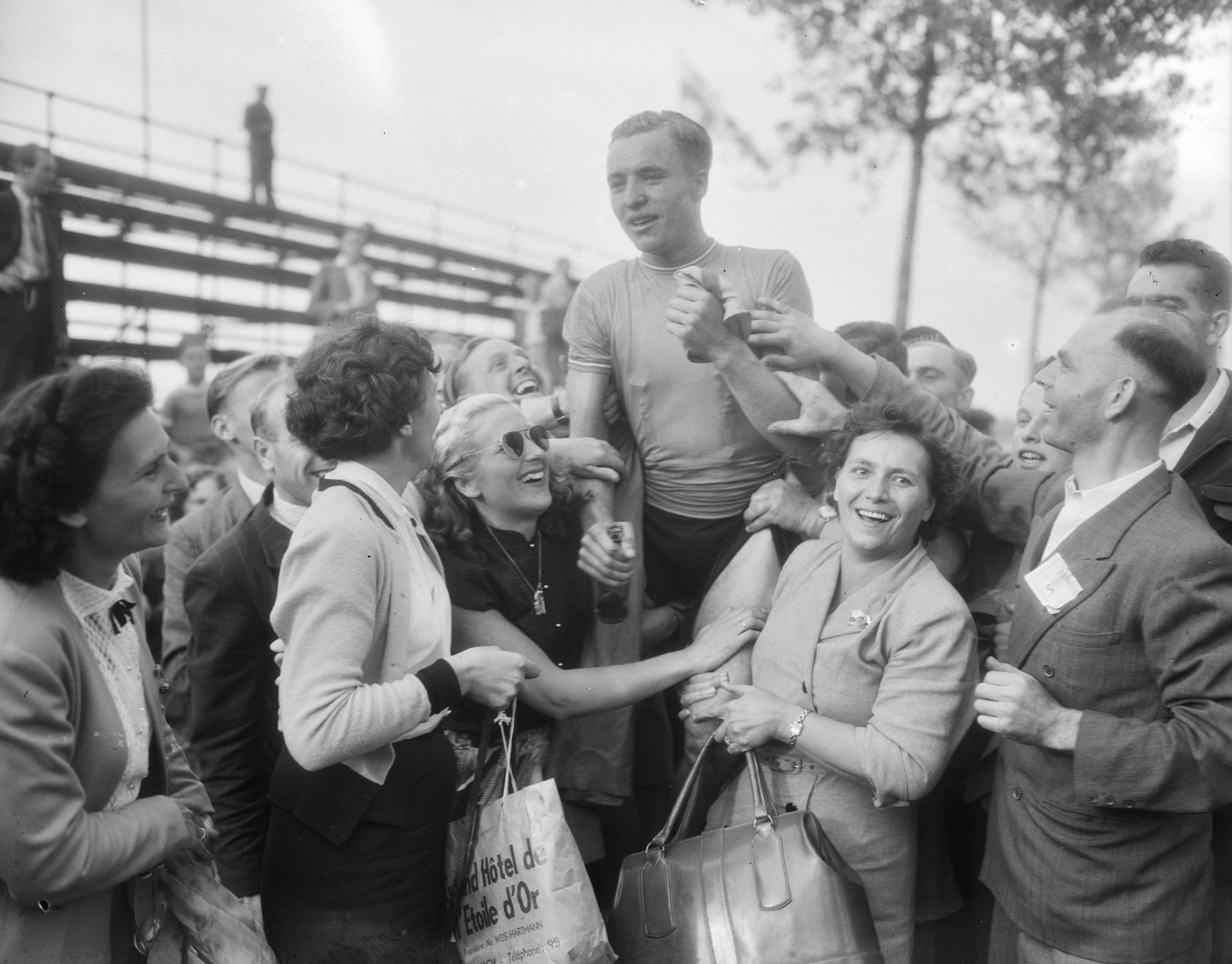 Collectie / Archief : Fotocollectie Anefo Reportage / Serie : [ onbekend ] Beschrijving : Wereldkampioenschappen Luxemburg. Van Brekel huldiging Datum : 23 augustus 1952 Locatie : Luxemburg Trefwoorden : huldigingen, wereldkampioenschappen Fotograaf : Pot, Harry / Anefo Auteursrechthebbende : Nationaal Archief Materiaalsoort : Negatief (zwart/wit) Nummer archiefinventaris : bekijk toegang 2.24.01.04 Bestanddeelnummer : 905-2743